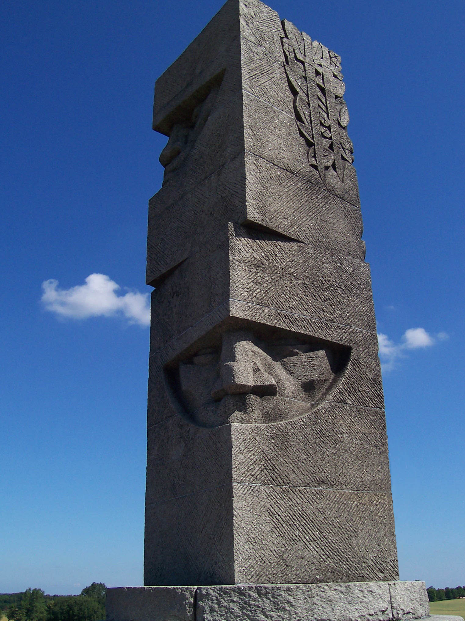 Granitowy obelisk na wzgorzu pomnikowym, na polach grunwaldzkich